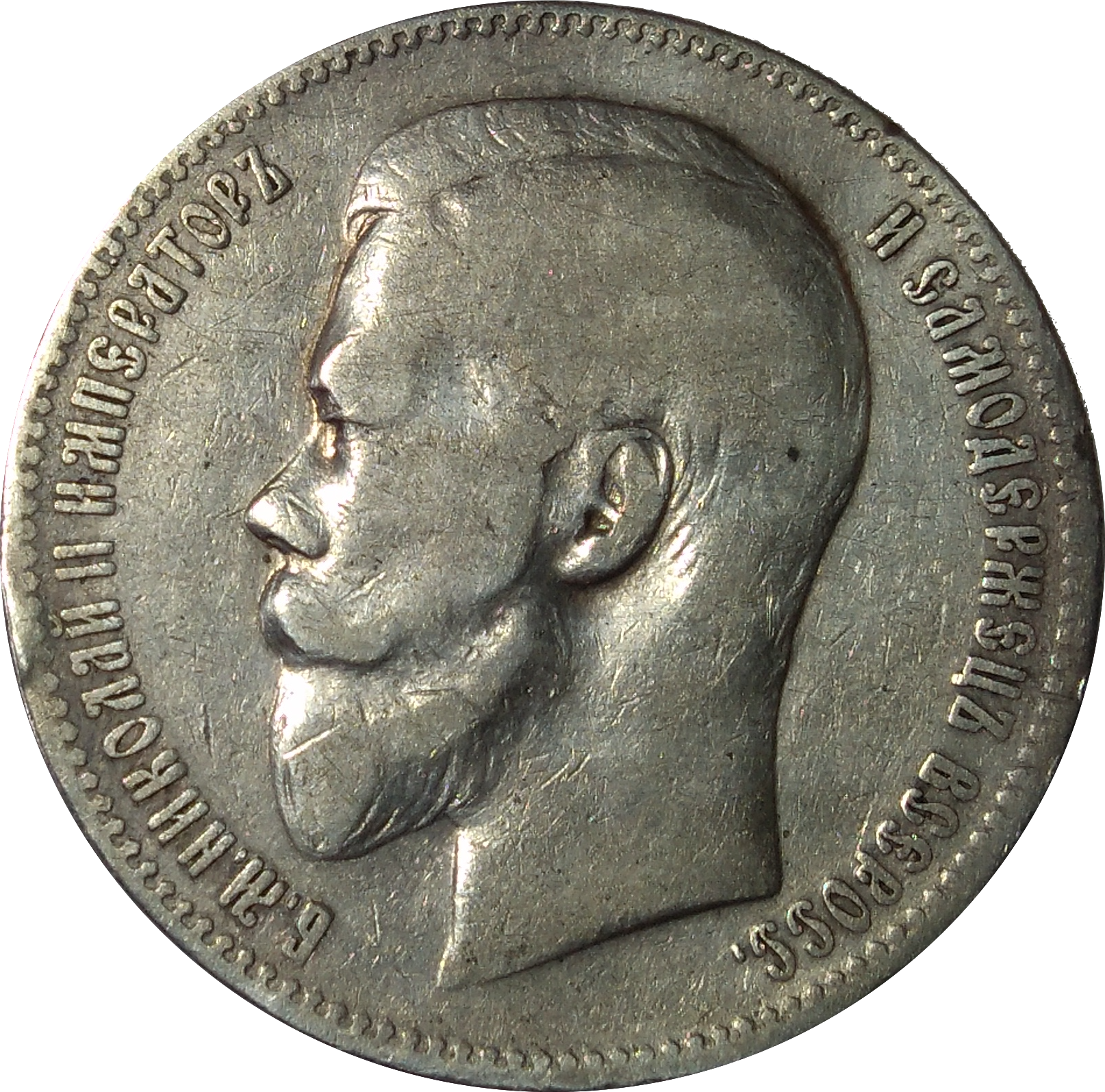 Anverso de una moneda de 1 rublo de 1897. Se puede ver el rostro del zar Nicolás II y el texto D.G. Nicolás II Emperador y Autocráta de Todas las Rusias